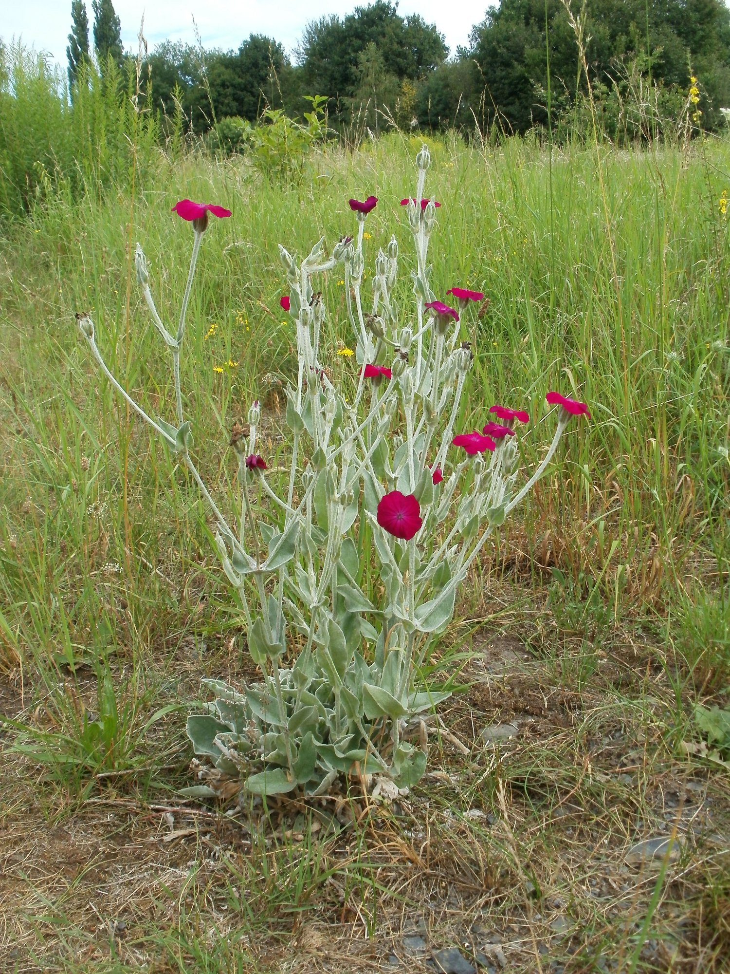 Ausgewilderte Kronen-Lichtnelke (Lychnis coronaria) asm Tierfriedhof Saarbrücken